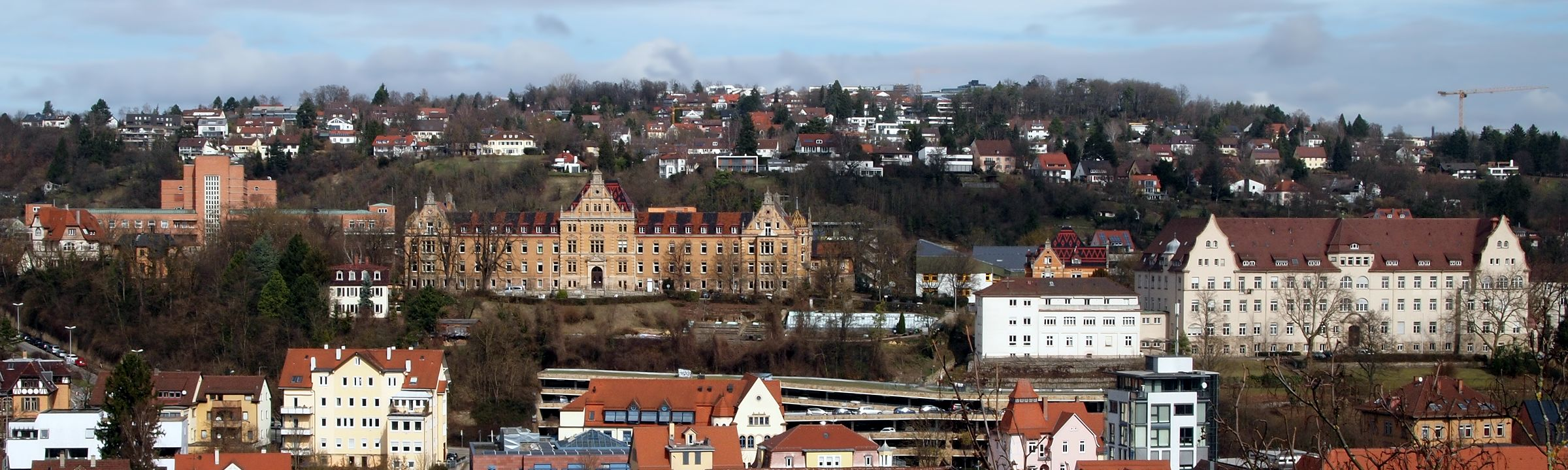 Kliniken Tal in Tübingen: Links die Frauenklinik erbaut als chirurgische Klinik, in der Mitte die psychiatrische Klinik und rechts die (inzwischen ehemalige) Augenklinik